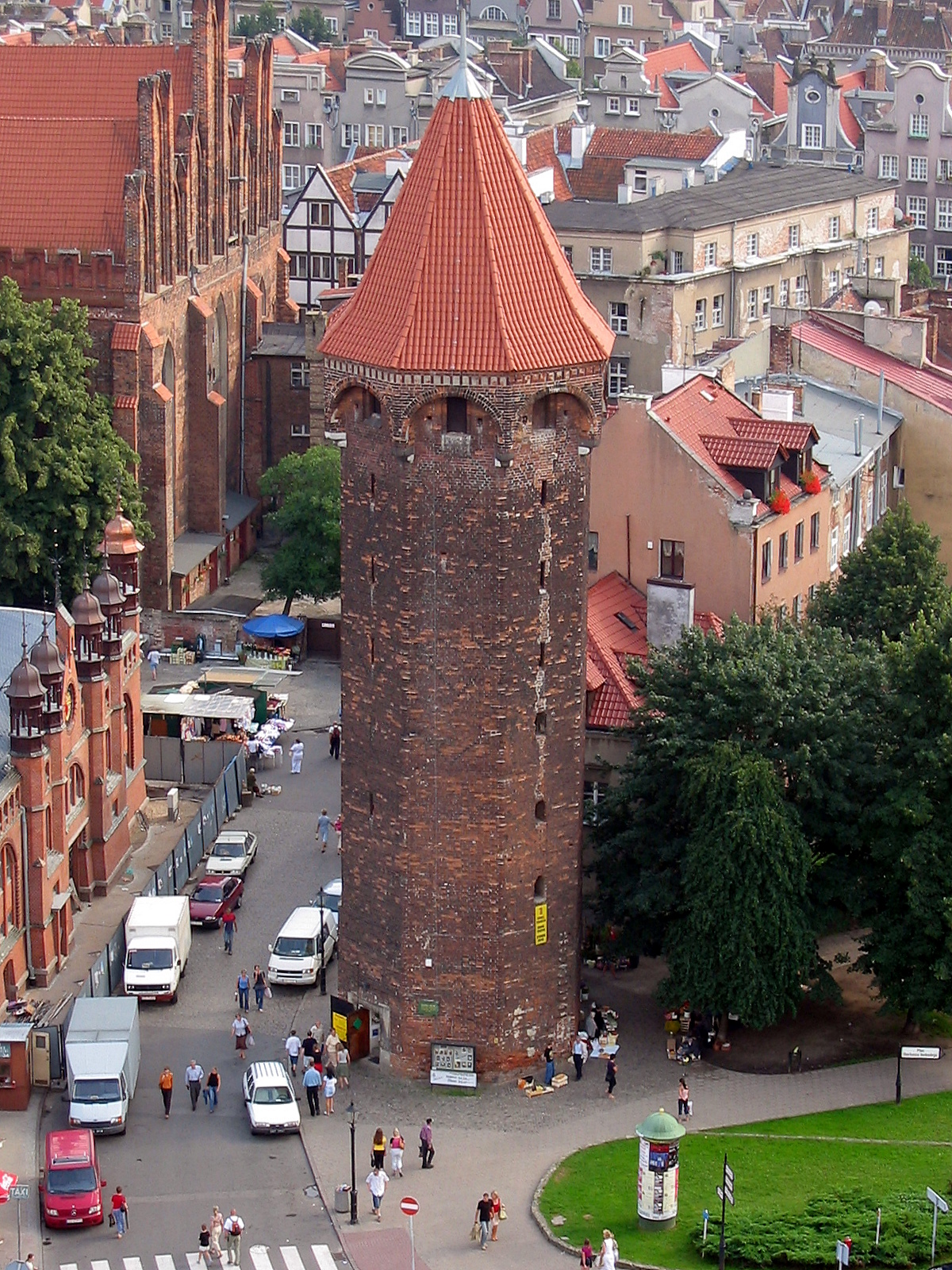 Gdańsk Główne Miasto, ul. Pańska 1 - Baszta Jacek w zespole średniowiecznych murów obronnych Głównego Miasta - z basztami, XIV-XV-XVI